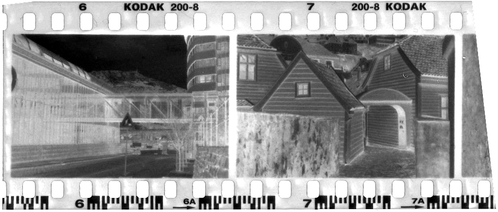 35mm negativ film